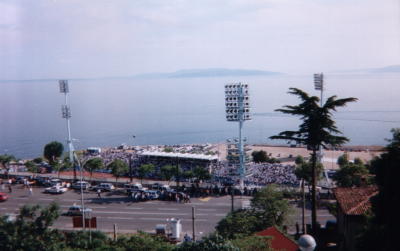 Igralište Kantrida, Rijeka